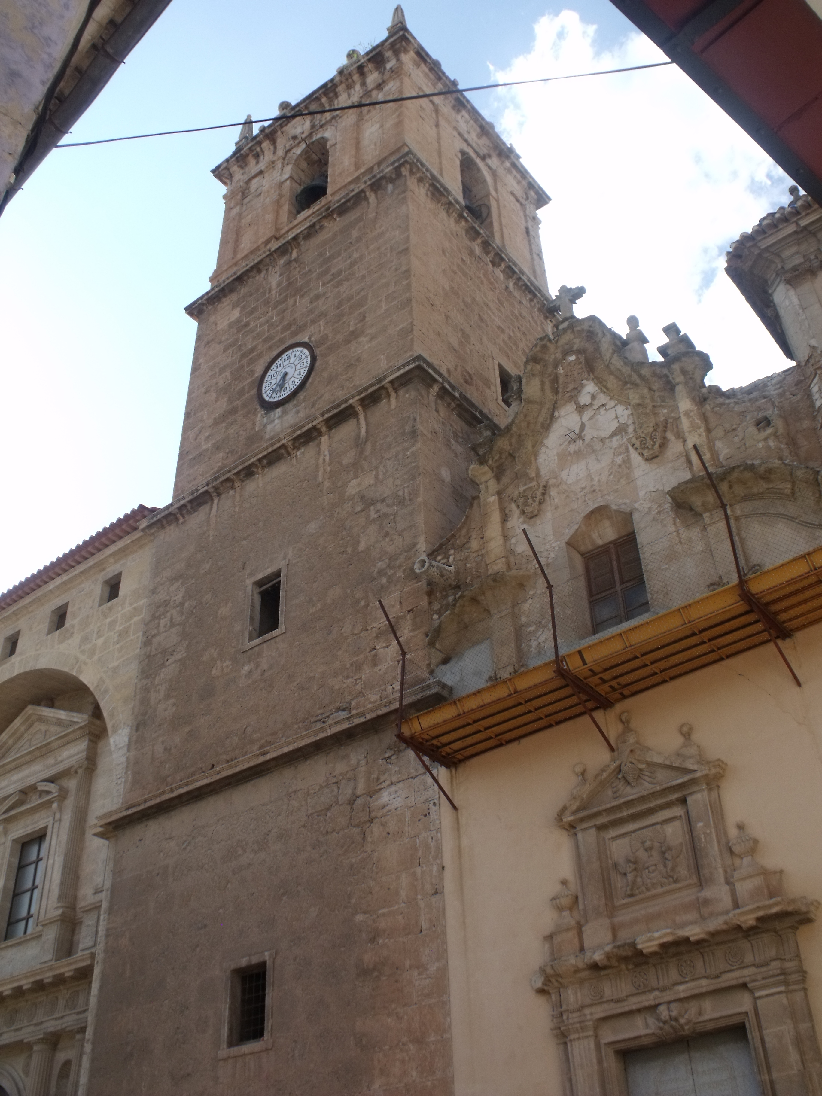 Detalle torre campanario de la iglesia de Nuestra Señora de la Asunción